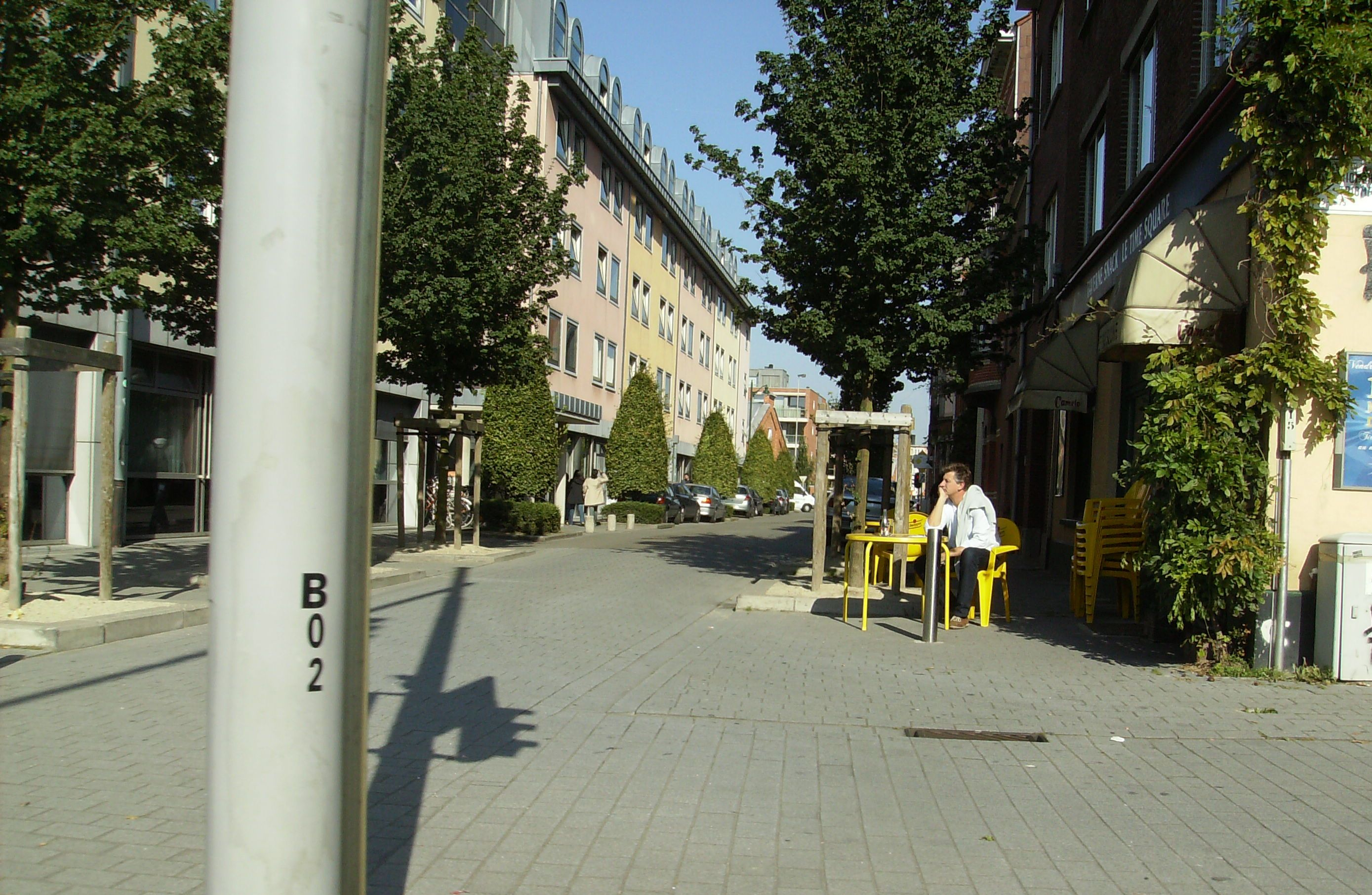 avenue Henri Schoofs Auderghem